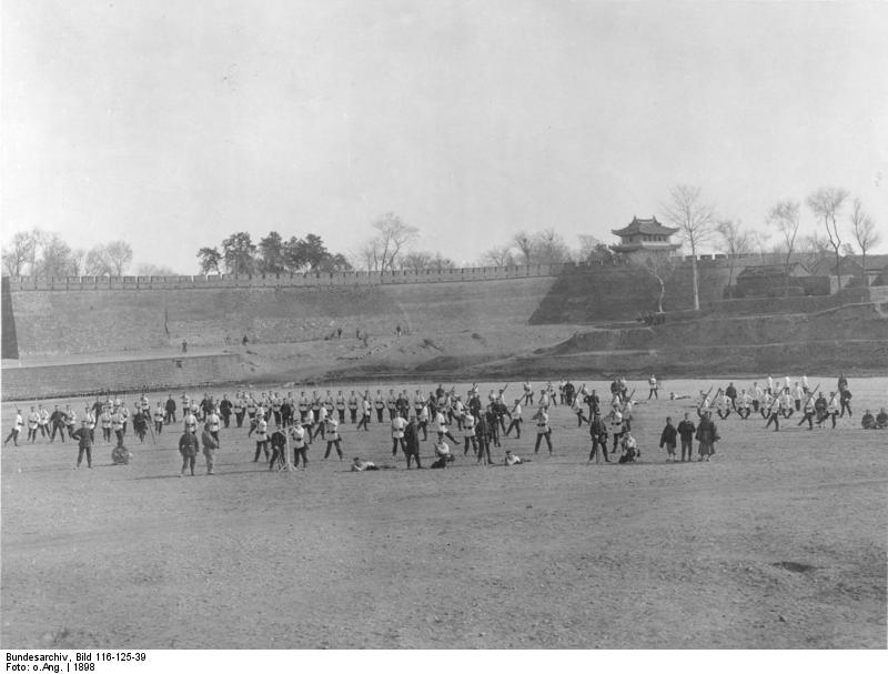 China 1898.- Tsimo Letztes Exerzieren der deutschen Truppen vor dem Abmarsch.